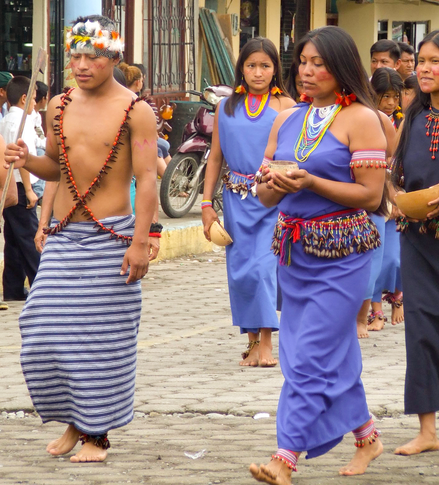 Shuar auf einer Feier zum Jubiläum von Huamboya